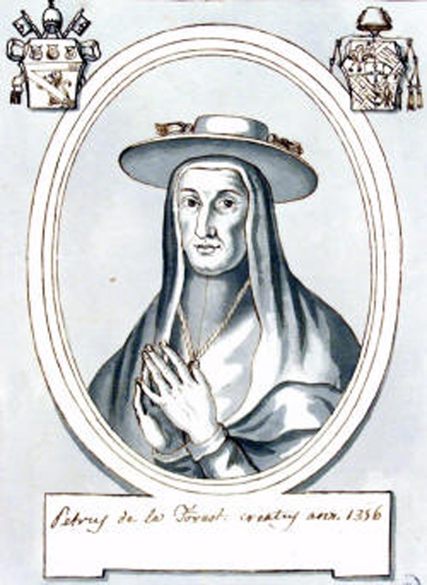 Cardinal Piere de la Forest